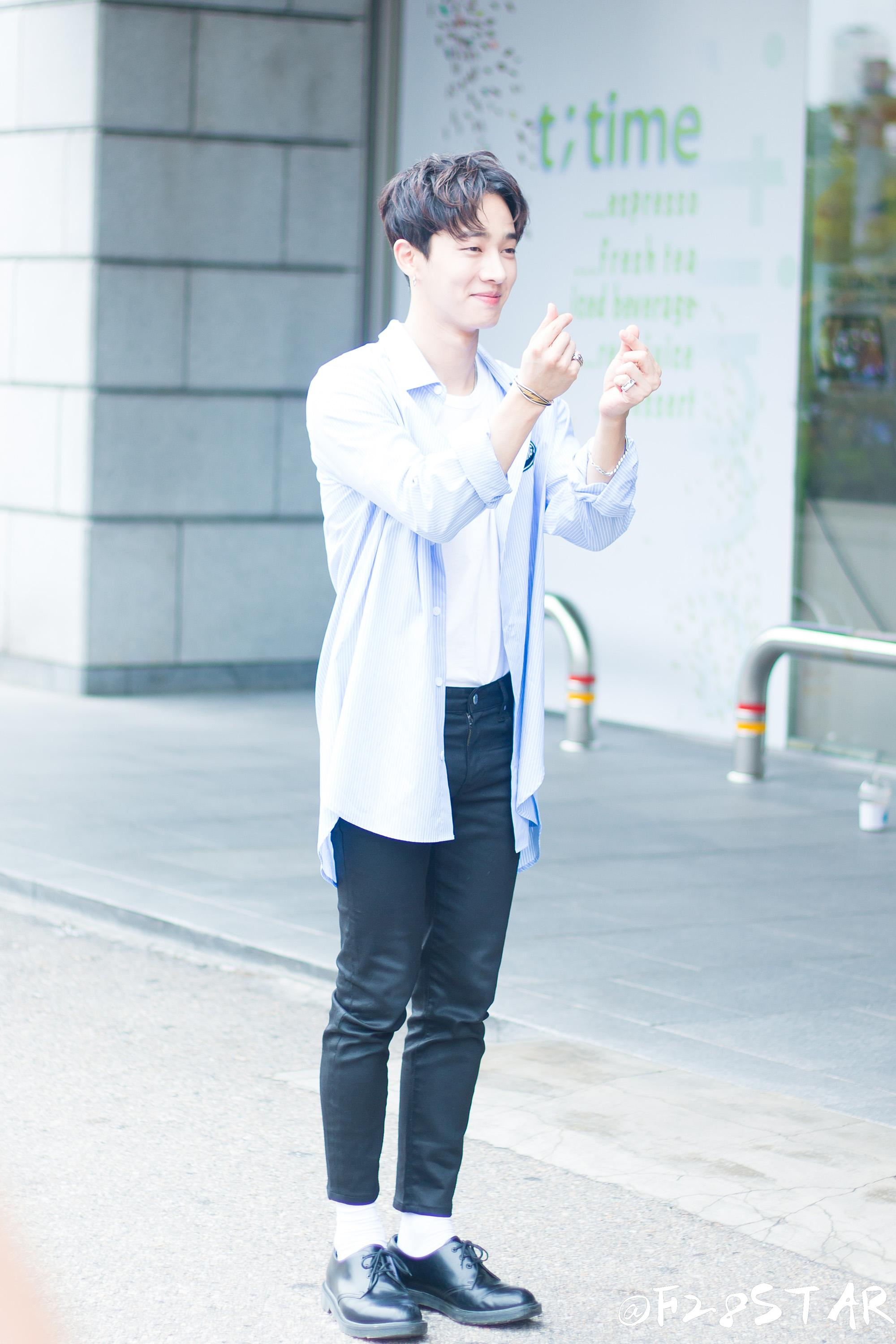 한국어 (조선): 20170819 해피투게더 출근길 이기광